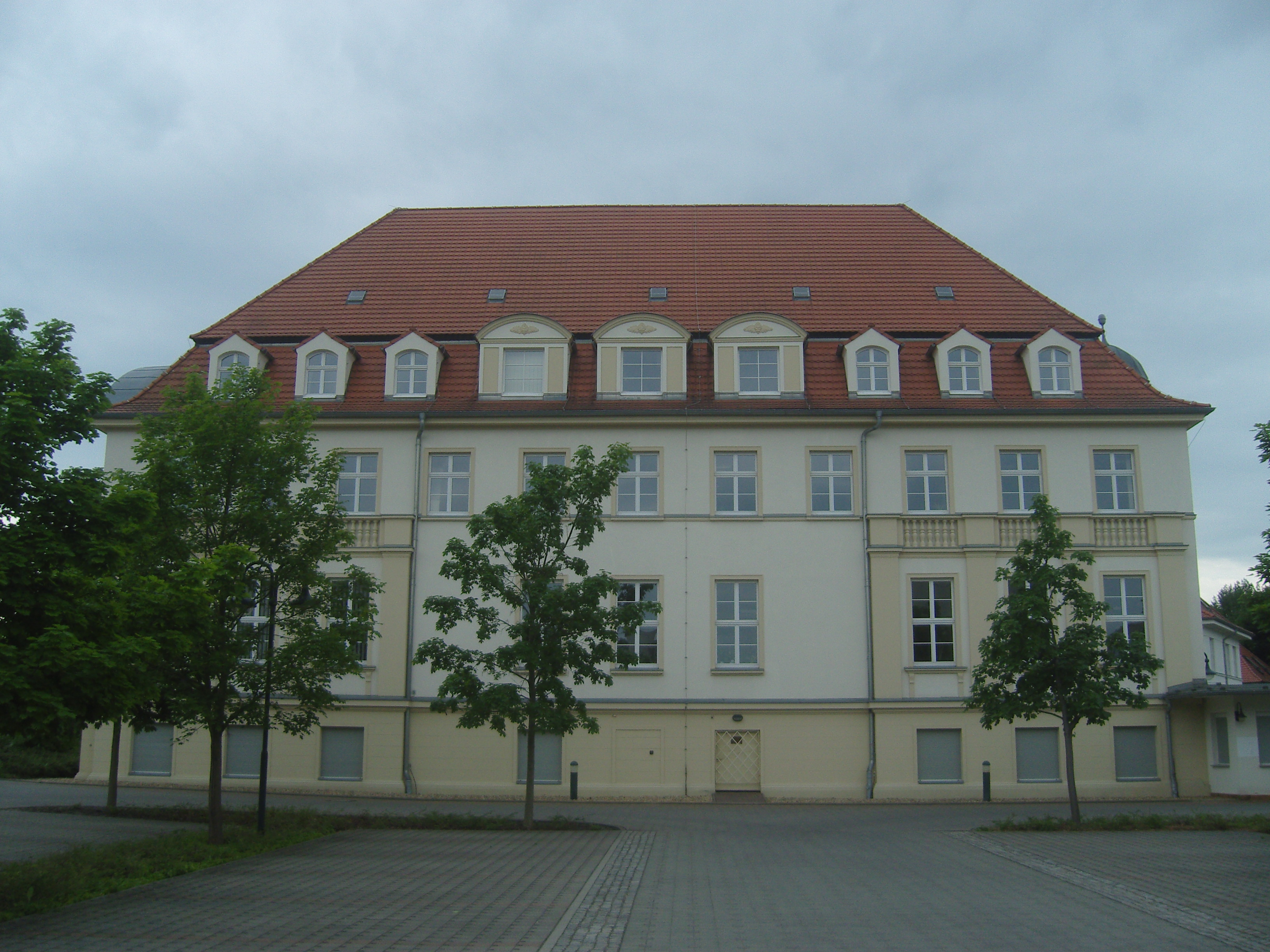 Seitenansicht des Bergbauhauses in Senftenberg; heute Sitz des Landratsamts des OSL-Kreises